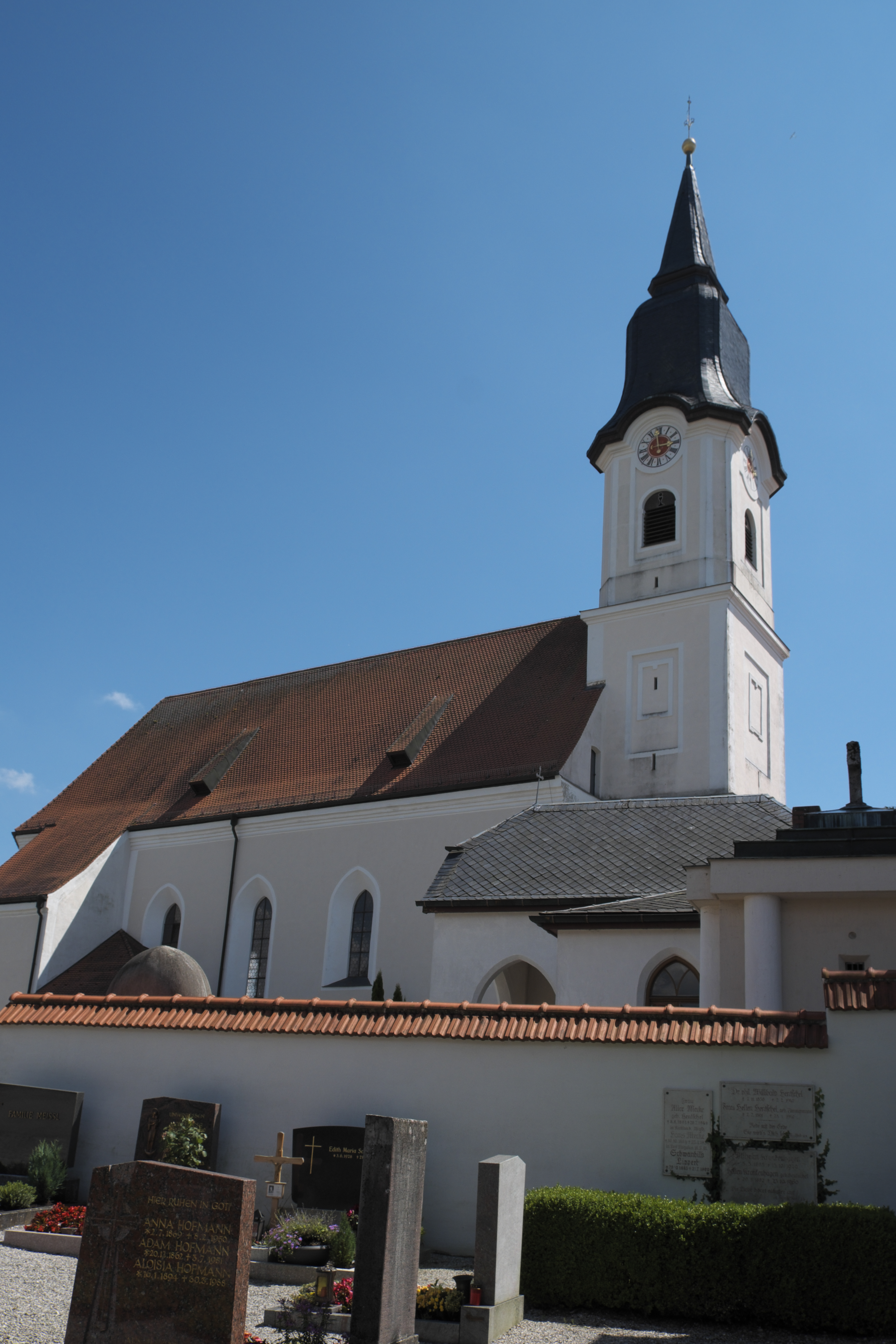 Katholische Pfarr- und Wallfahrtskirche Mariä Himmelfahrt in Aufkirchen, einem Ortsteil der Gemeinde Berg im Landkreis Starnberg (Bayern/Deutschland)